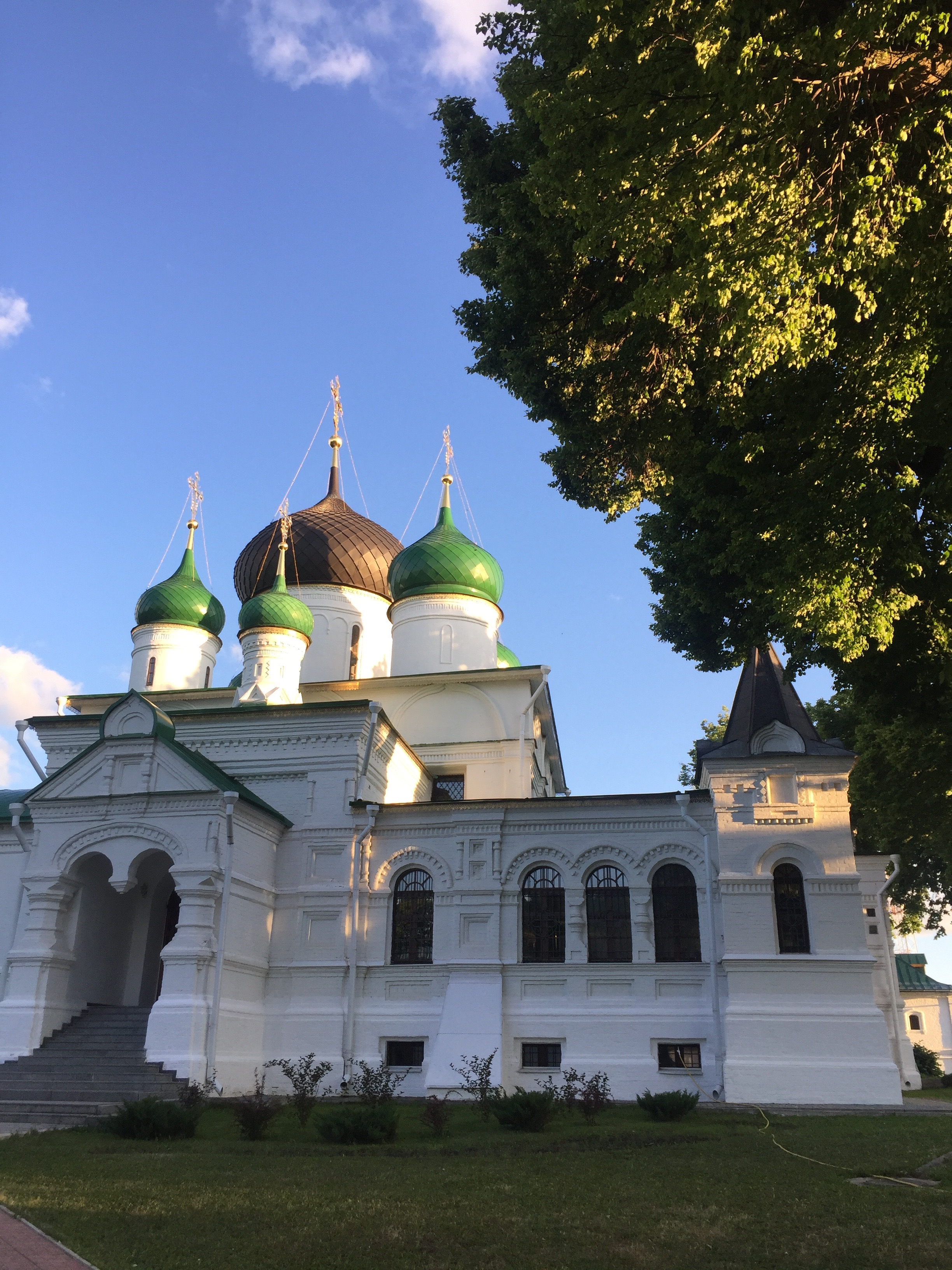 Собор во имя великомученика Феодора Стратилата XVI века.